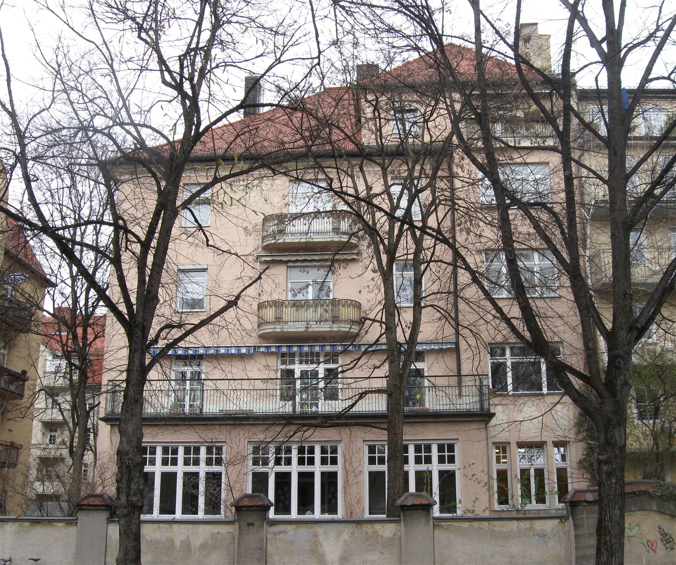 Adalbertstraße 106; Krippen-Anstalt, Jugendstil, mit Balkongittern, Relief und Vorgartentor, 1903 von Paul Liebergesell und Feodor Lehmann.